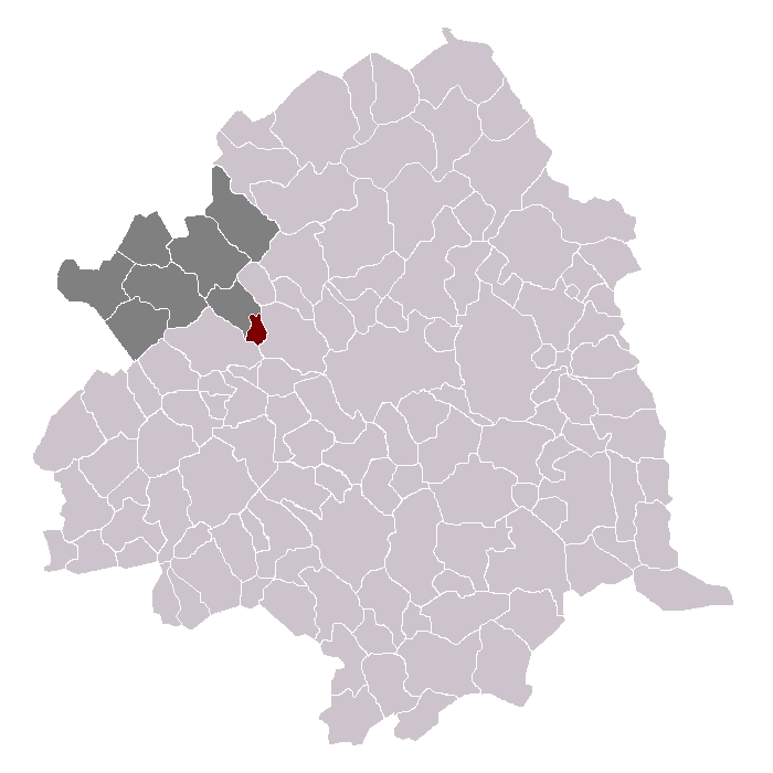 Capinghem,dans le canton d'Armentieres, arrondissement de Lille